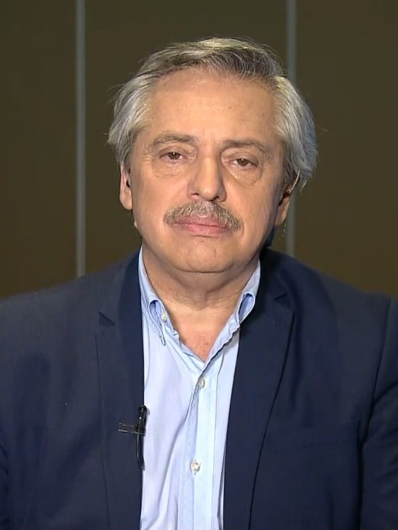 Alberto Fernández en el programa de televisión A DOS VOCES.